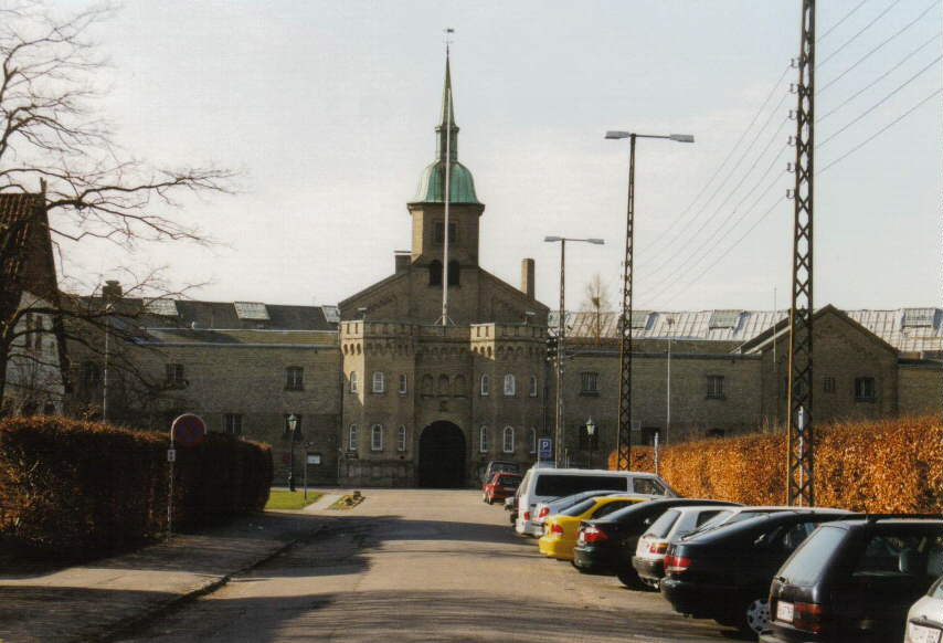 Sikringsanstalten Herstedvester i Albertslund, hovedtilholdsted for filmhelten Egon Olsen fra Olsenbanden